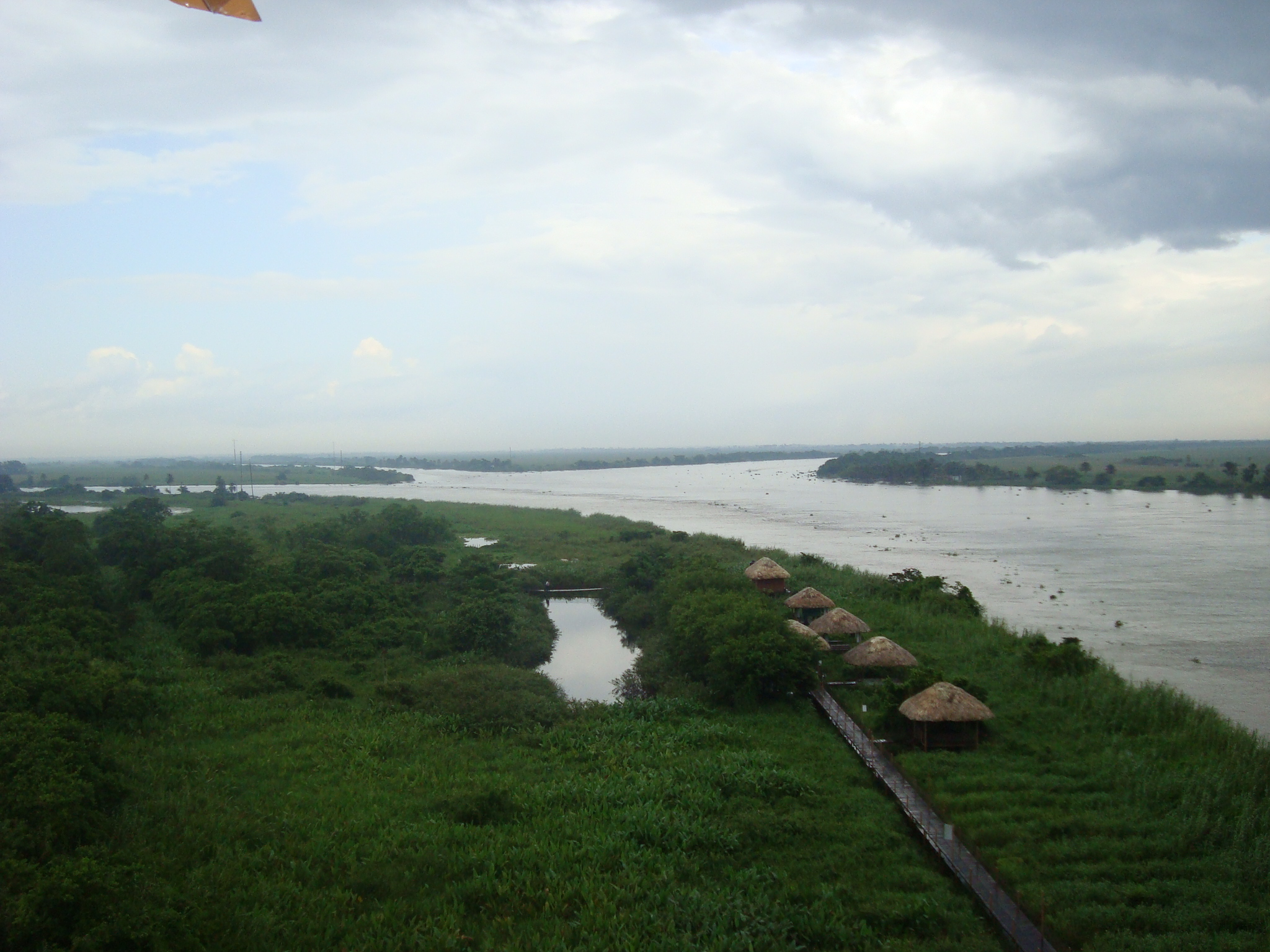 Estación "Tres Brazos" donde se encuentra la "Casa del Agua" en la Reserva de la Biosfera Pantanos de Centla, estado de Tabasco.